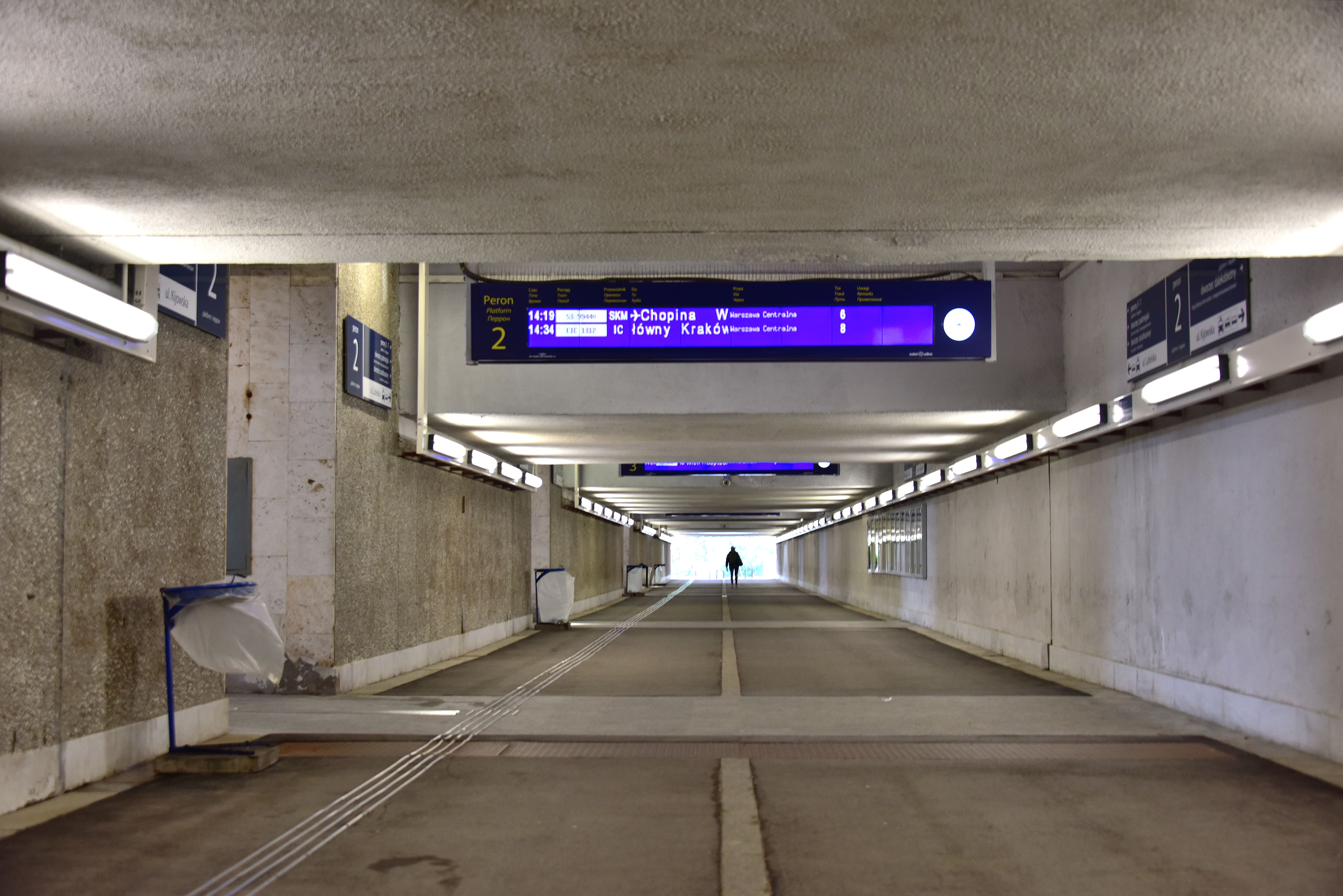 Tunel Dworca Wschodniego w Warszawie